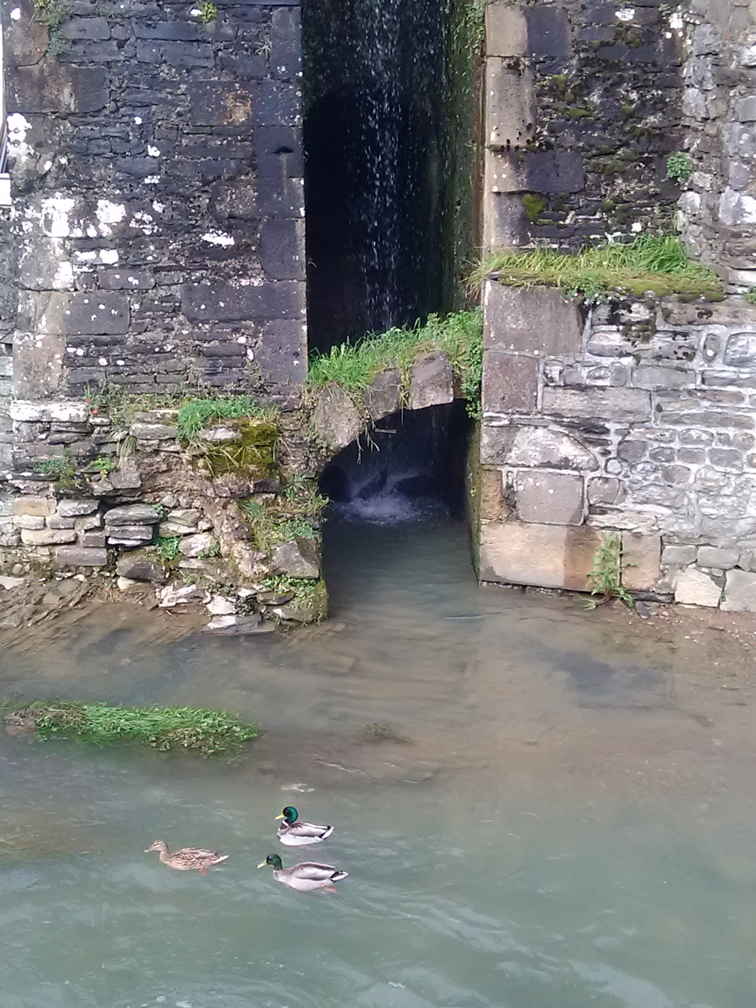 Olaerreaga etxea (edo Olaerregeaga), izen bereko Zaldibarko auzoan, Eibar eta Ermua artean. Burdinola hau Ego ibarra egitura administratiboaren parte zen XIII. mendean, Eibar eta Ermuko hiribilduak sortu baino lehen.